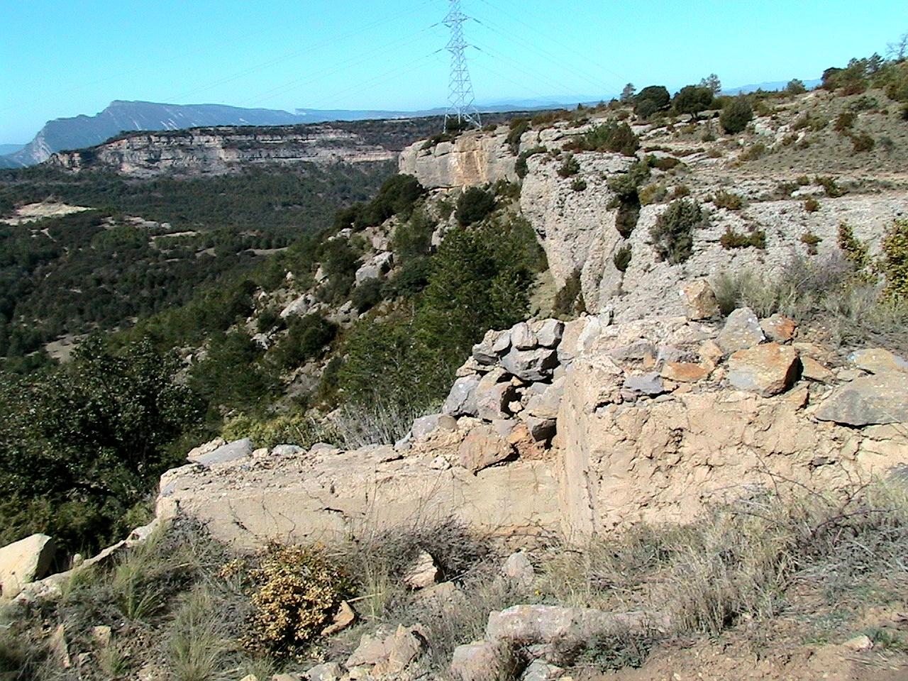 Cim del Tossal del Vigatà amb construccions defensives de la guerra civil. A Gavet de la Conca (Pallars Jussà - Catalunya)